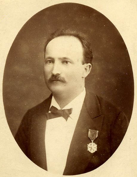 Photographie du rosiériste Joseph Schwartz (1846-1885).